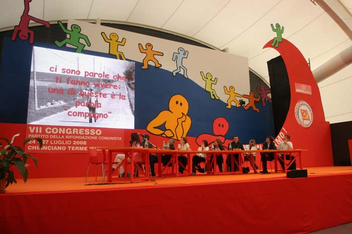 VII Congresso del PRC